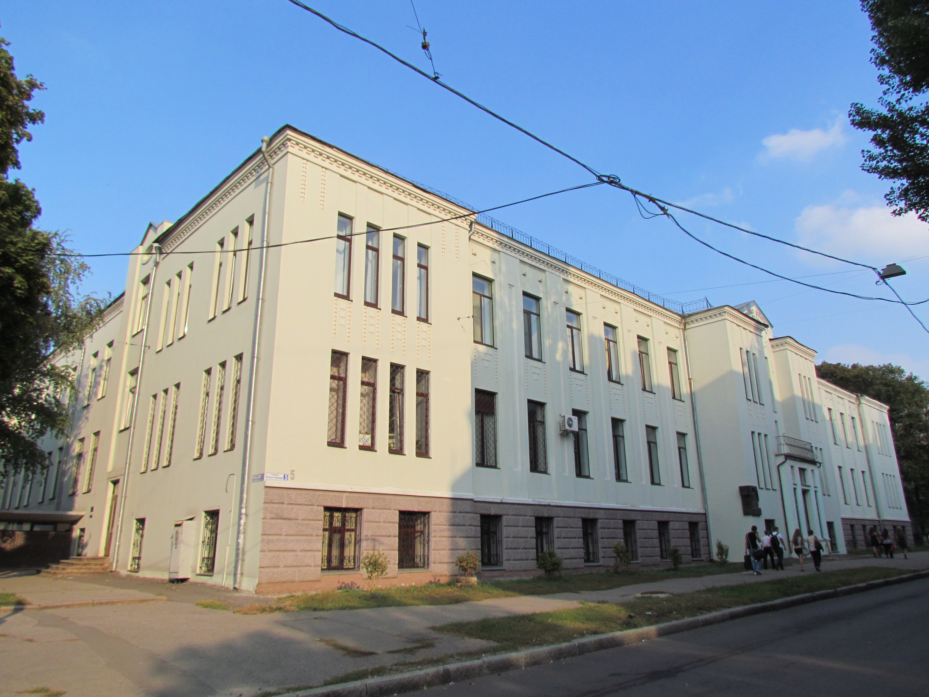 Україна, Харків, вул. Гончара, 5